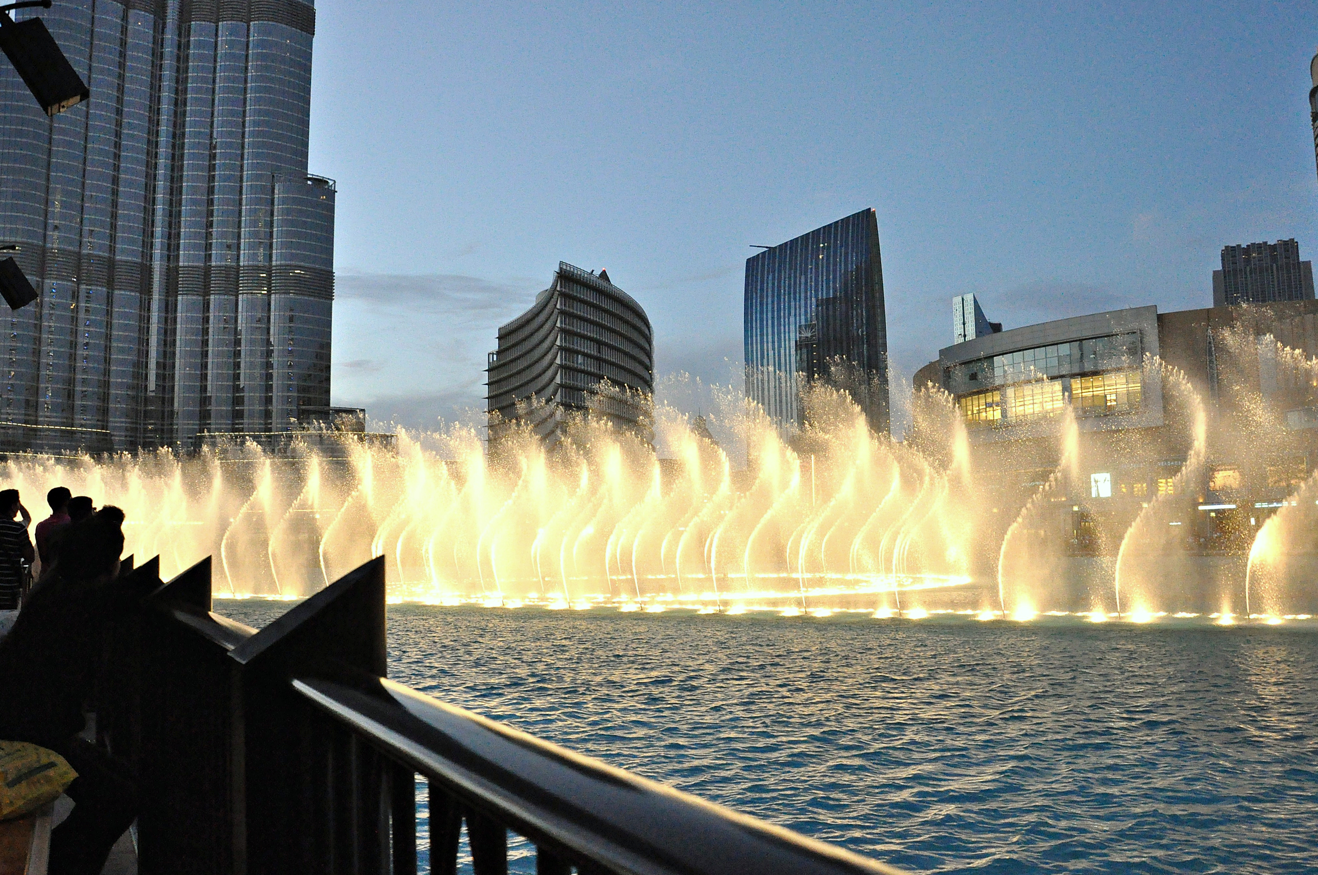 emiratos arabes